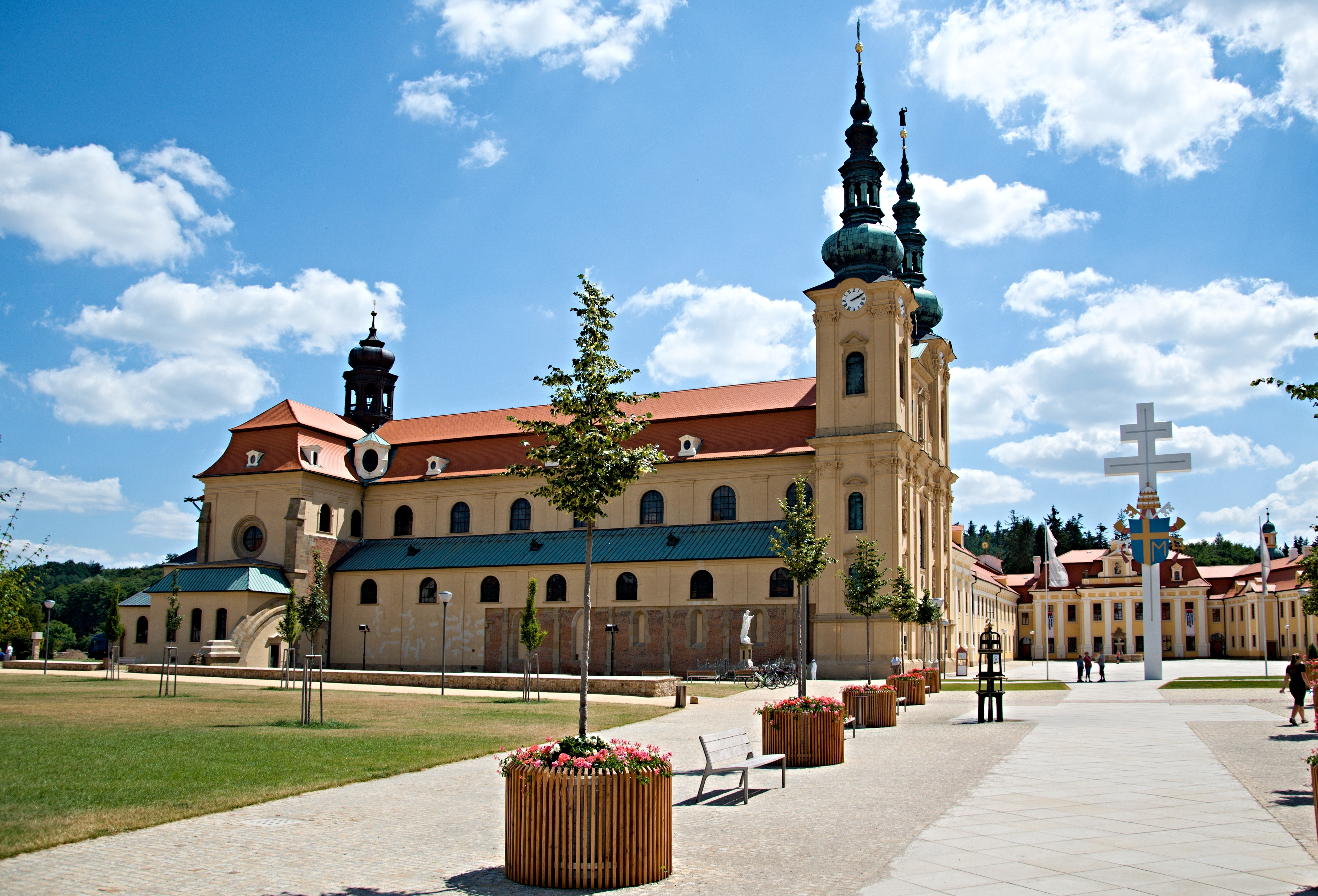 Klášter cisterciáků (Velehrad), Velehrad 1.